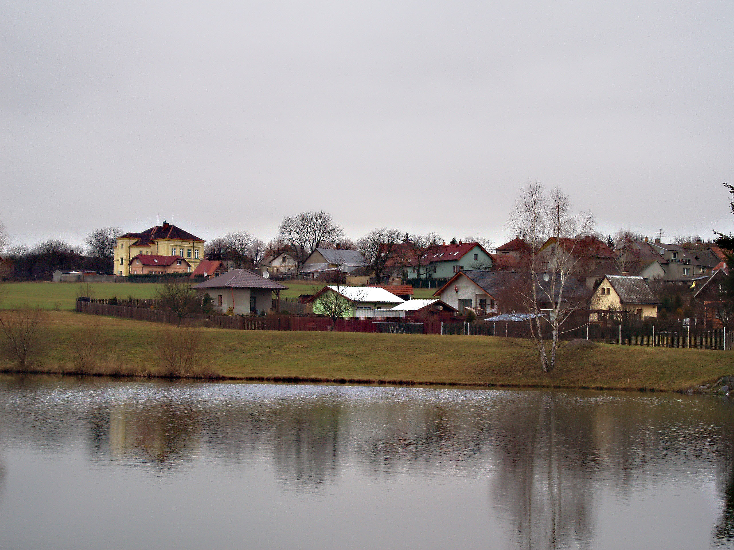 Háje - celkový pohled